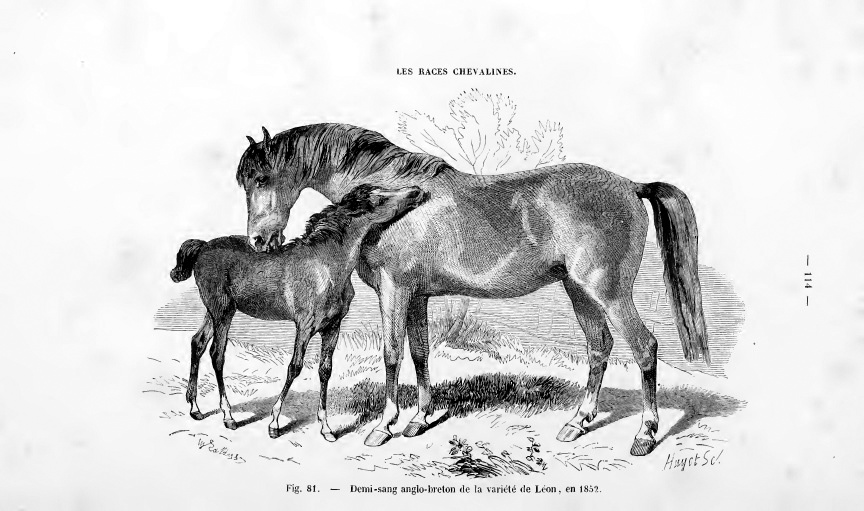 Cheval anglo-breton du pays de Léon